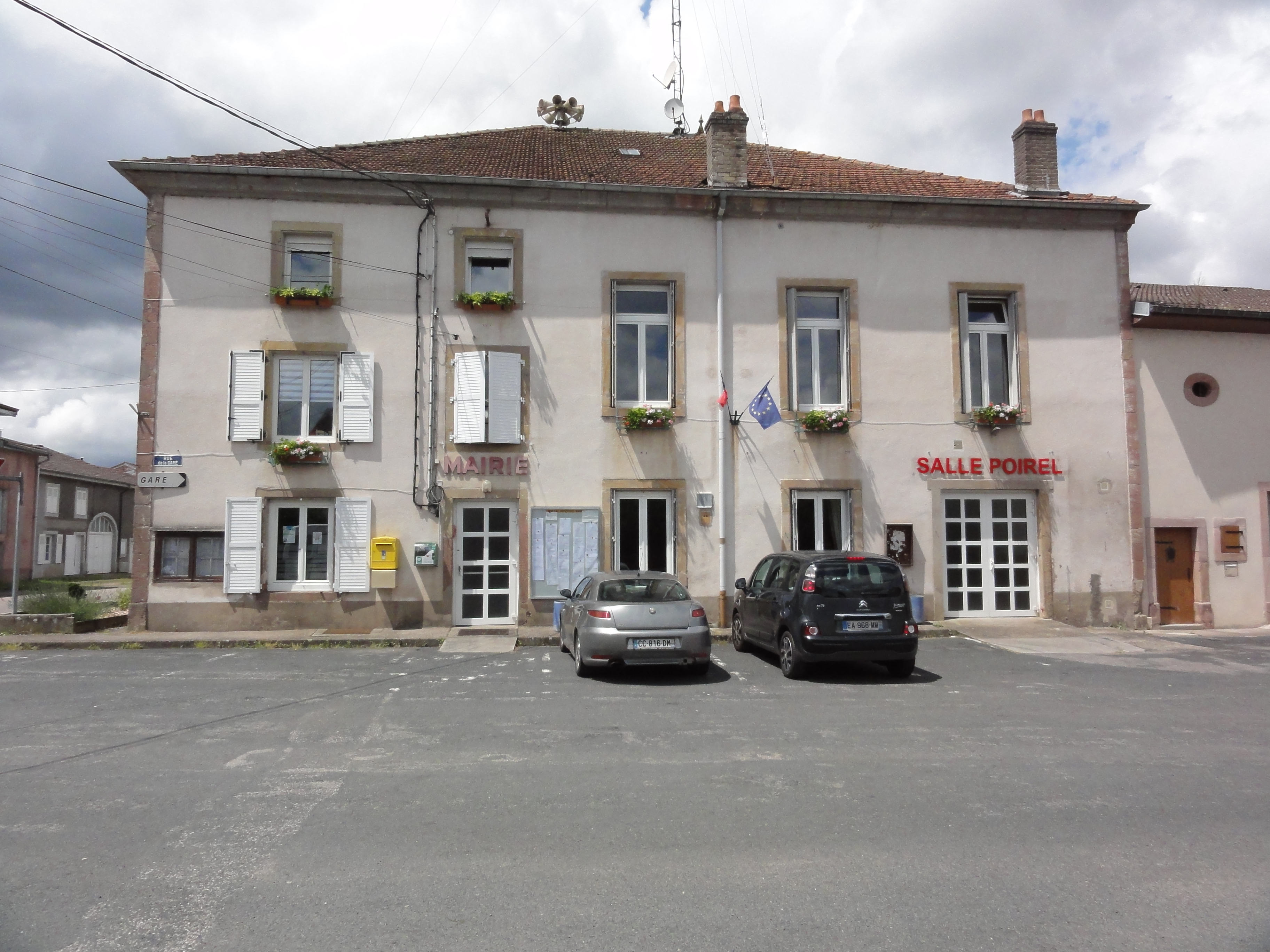 Thiaville-sur-Meurthe (M-et-M) mairie et salle Poirel